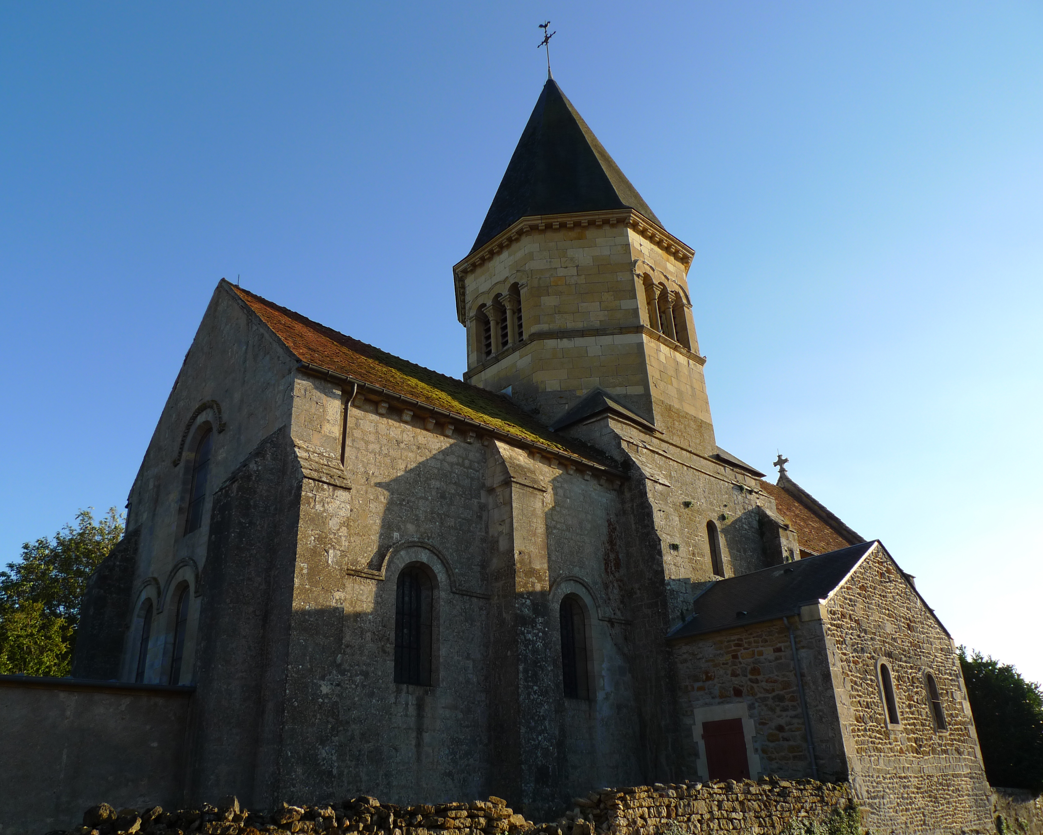 Église Saint-Fiacre d'Ourouër, (Classé, 1907) .